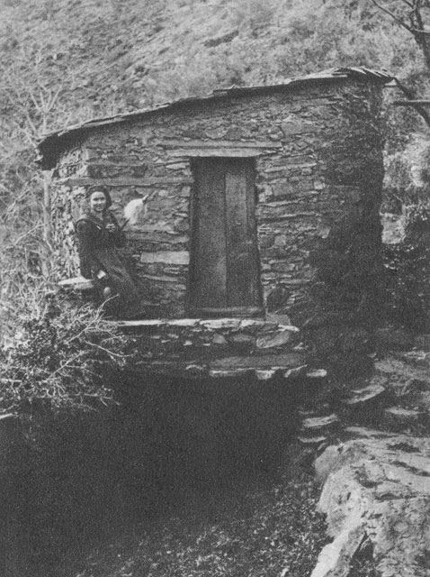 Casa - Martinandrán (Salamanca) - España Turística y Monumental / Cuarto álbum / Las Bellezas de Castilla / Región Leonesa - Cromo 70 x 90 Sepia